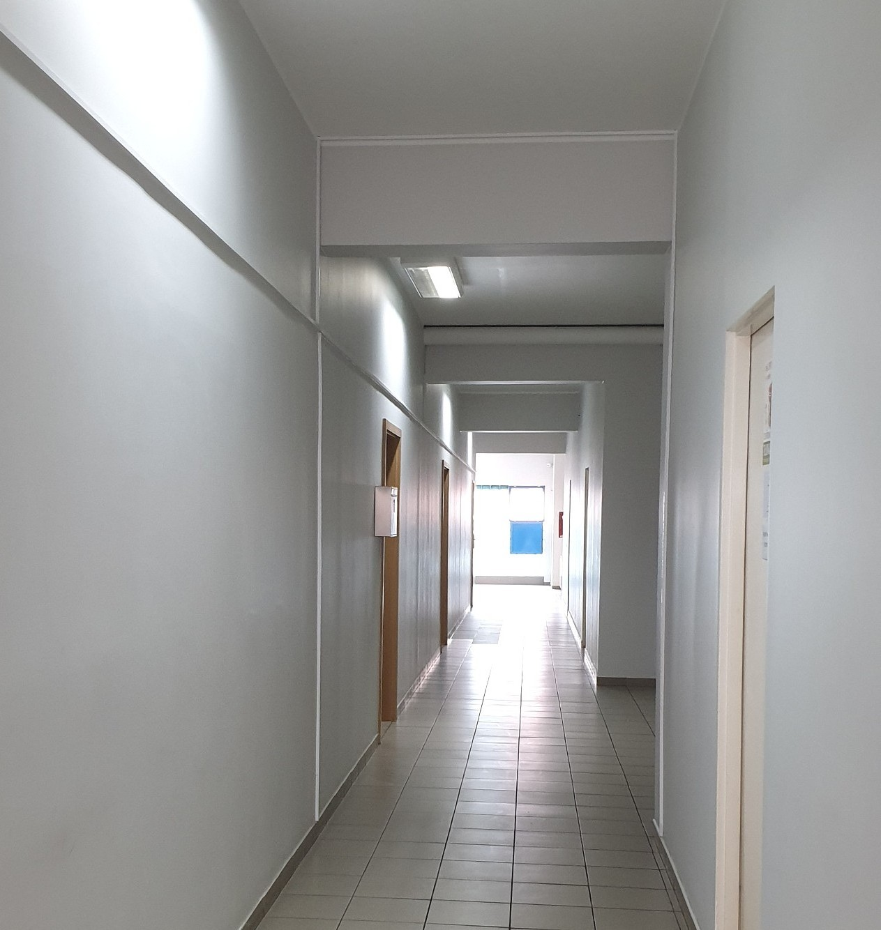 Redakcja Głosu Szczecińskiego